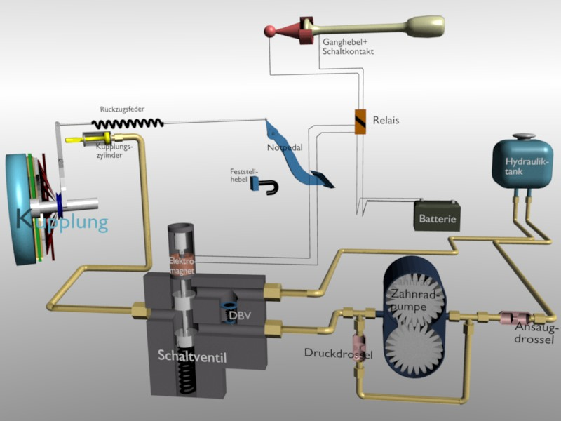 Notbetätigung und Bauteilbeschreibung vom Hycomat 3D